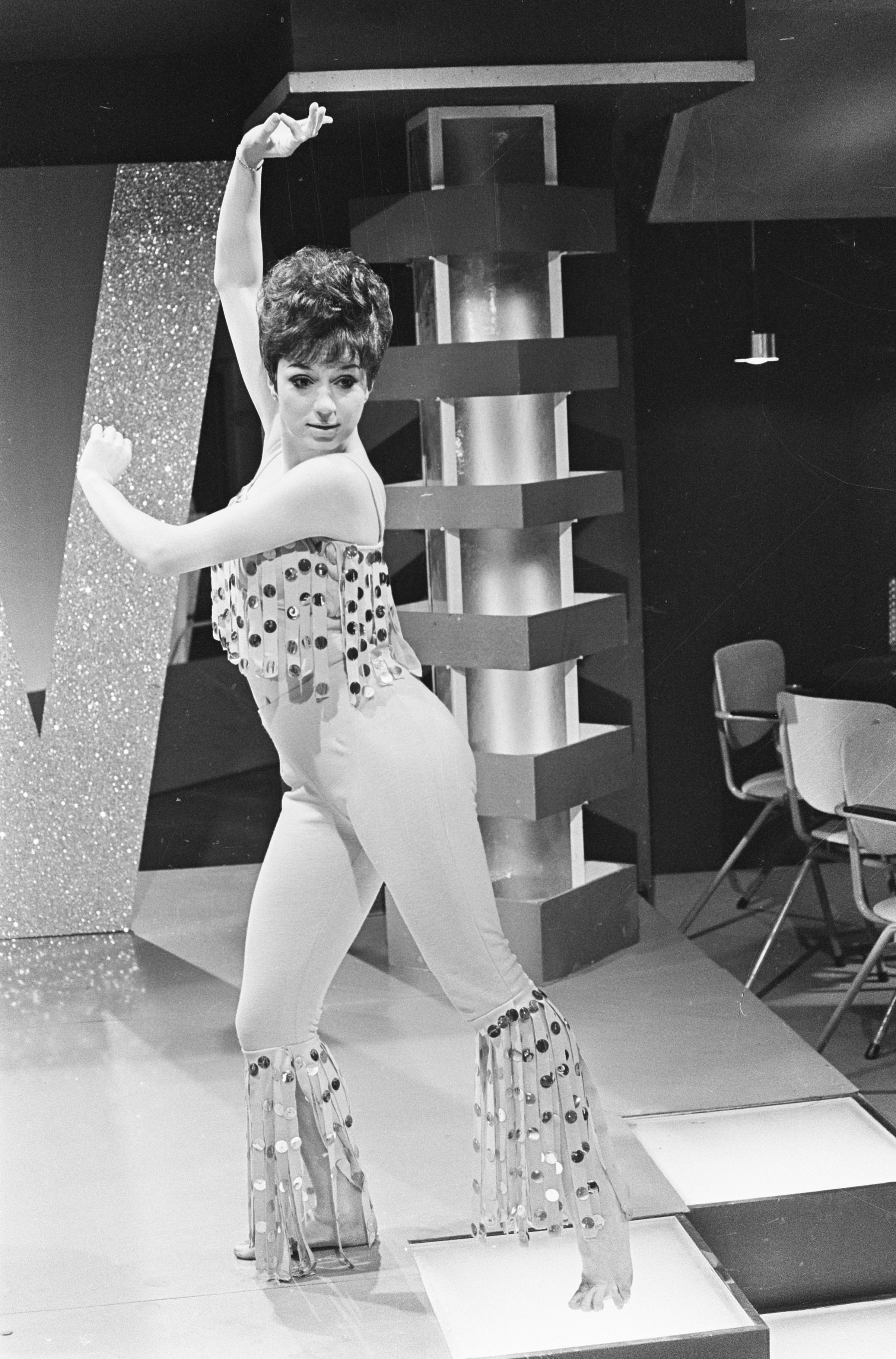 Collectie / Archief : Fotocollectie Anefo Reportage / Serie : [ onbekend ] Beschrijving : Willy en Willeke show, Corrie van Gorp tijdens haar mam Datum : 1 februari 1967 Trefwoorden : shows Persoonsnaam : Gorp, Corrie van Fotograaf : Kroon, Ron / Anefo Auteursrechthebbende : Nationaal Archief Materiaalsoort : Negatief (zwart/wit) Nummer archiefinventaris : bekijk toegang 2.24.01.05 Bestanddeelnummer : 920-0344